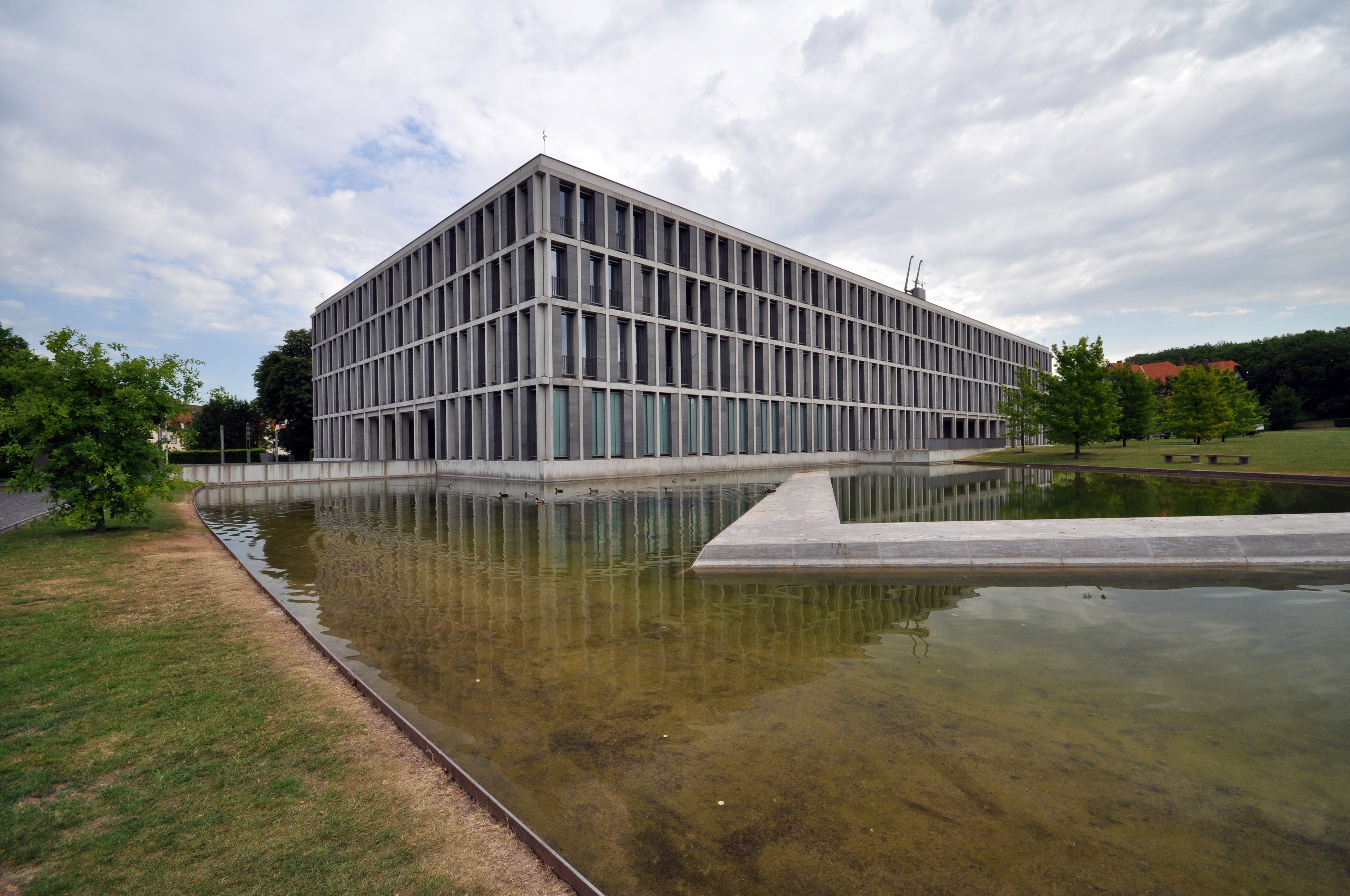 Bundesarbeitsgericht Erfurt